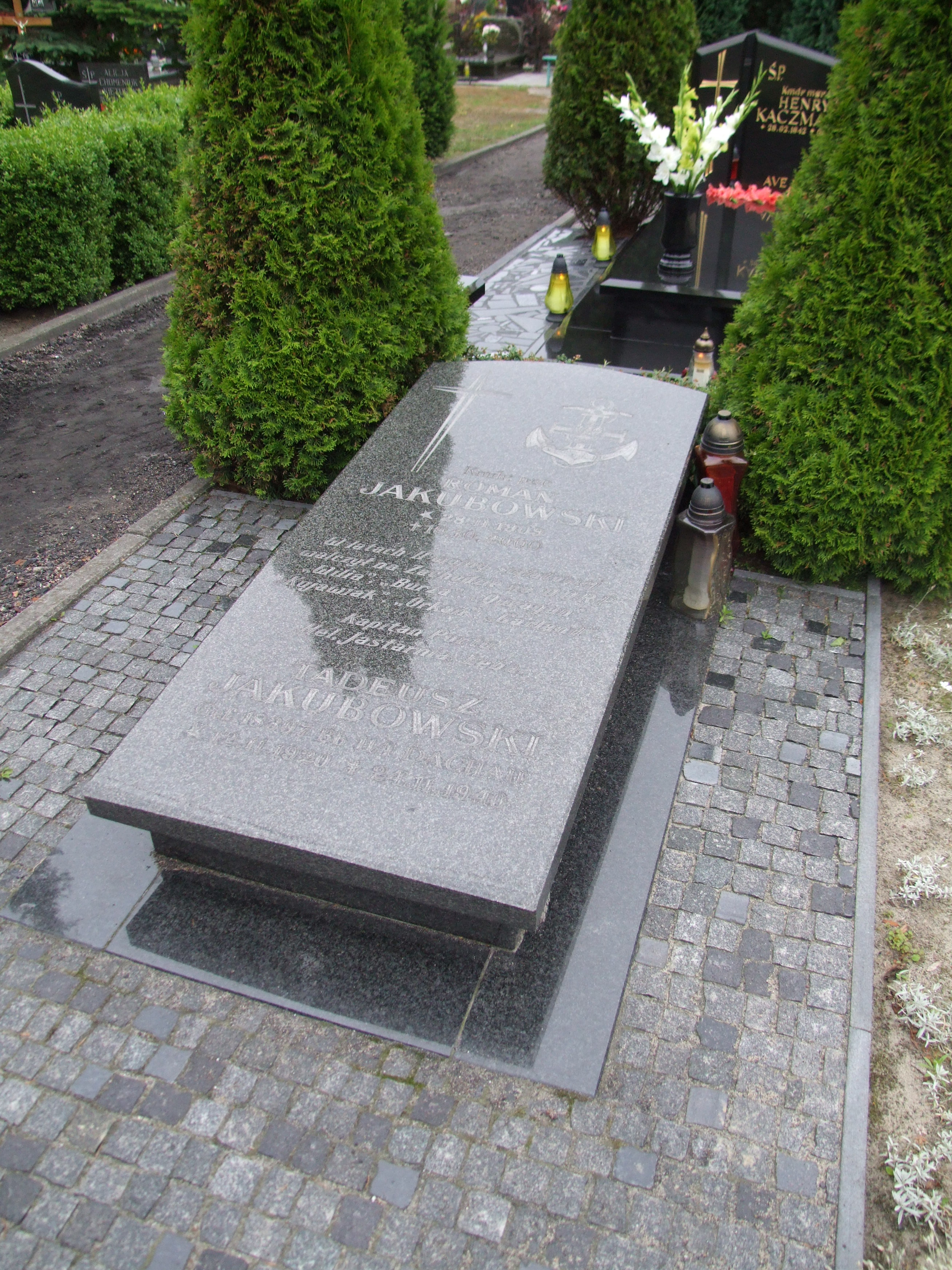 Gdynia-Oksywie Cmentarz Marynarki Wojennej